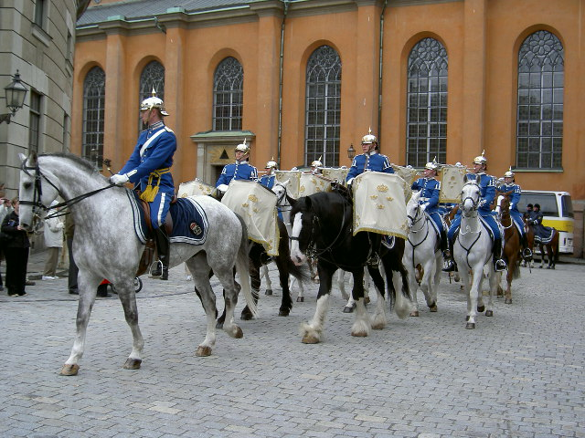 Stockholm Palota Orsegvaltas Sajat digikamera, Brendel Matyas. --Math 2005. július 18., 13:43 (CEST) hivatkozando forras: Brendel Matyas